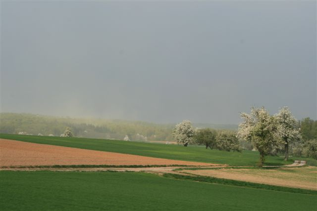 Kraichgau, Landschaft bei Epfenbach, Baden, Deutschland